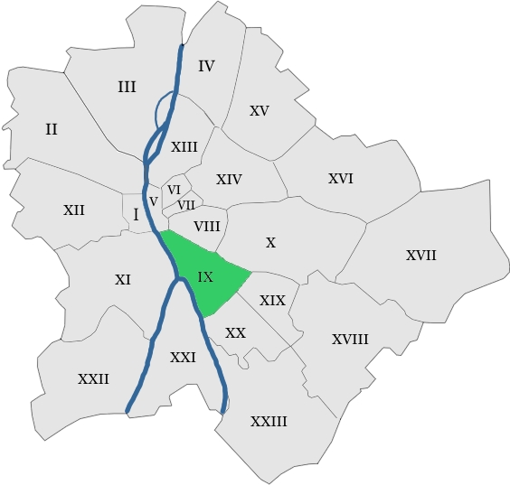 map hungary budapest district 9